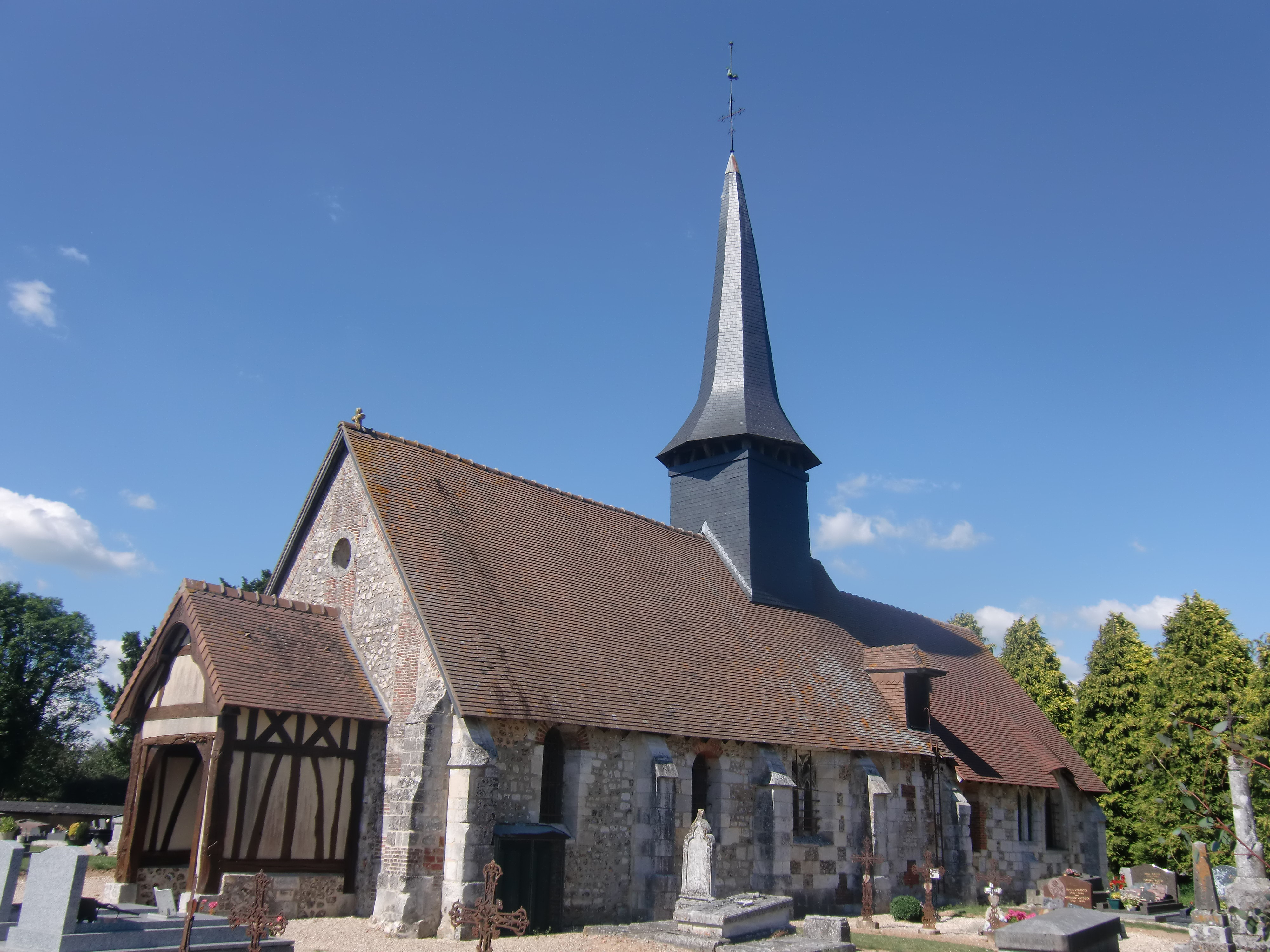 Eglise de Flancourt (Flancourt-Catelon, Eure, Normandie, France)